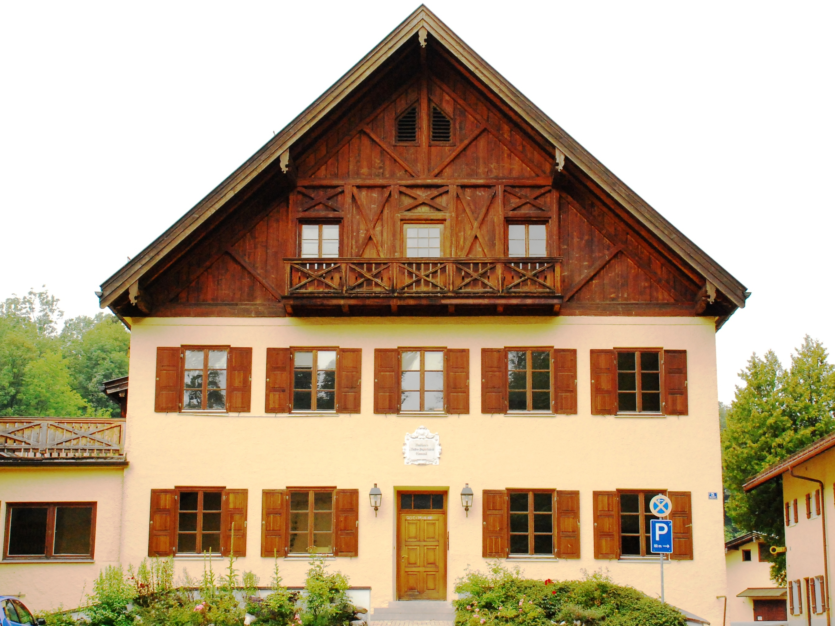 Verwaltungsgebäude der Büttenpapierfabrik in Gmund am Tegernsee, Landkreis Miesbach, Regierungsbezirk Oberbayern, Bayern.